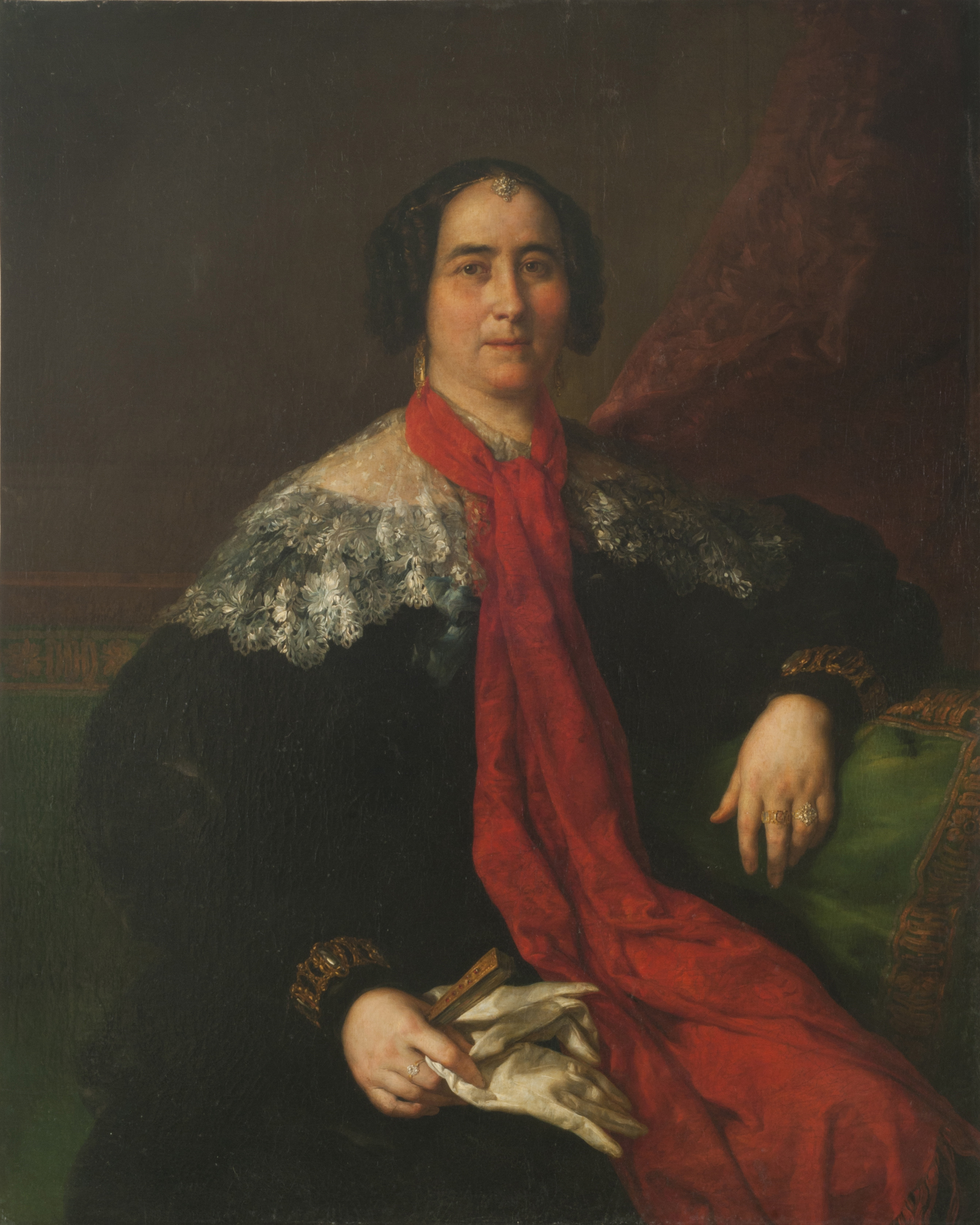 Vicente López y Portaña